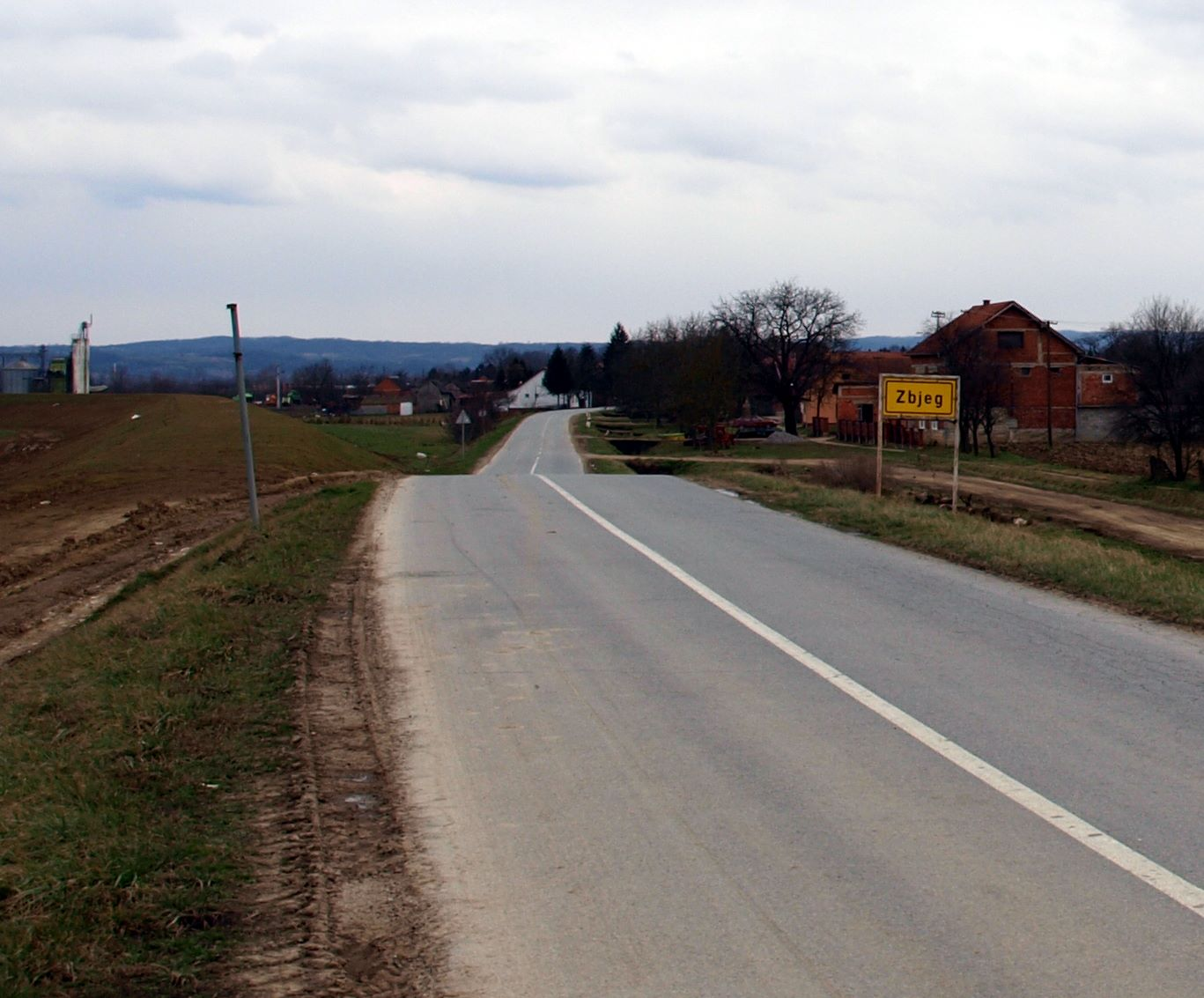 Ulaz u selo Zbjeg, koje se nalazi u Brodsko-posavskoj županiji